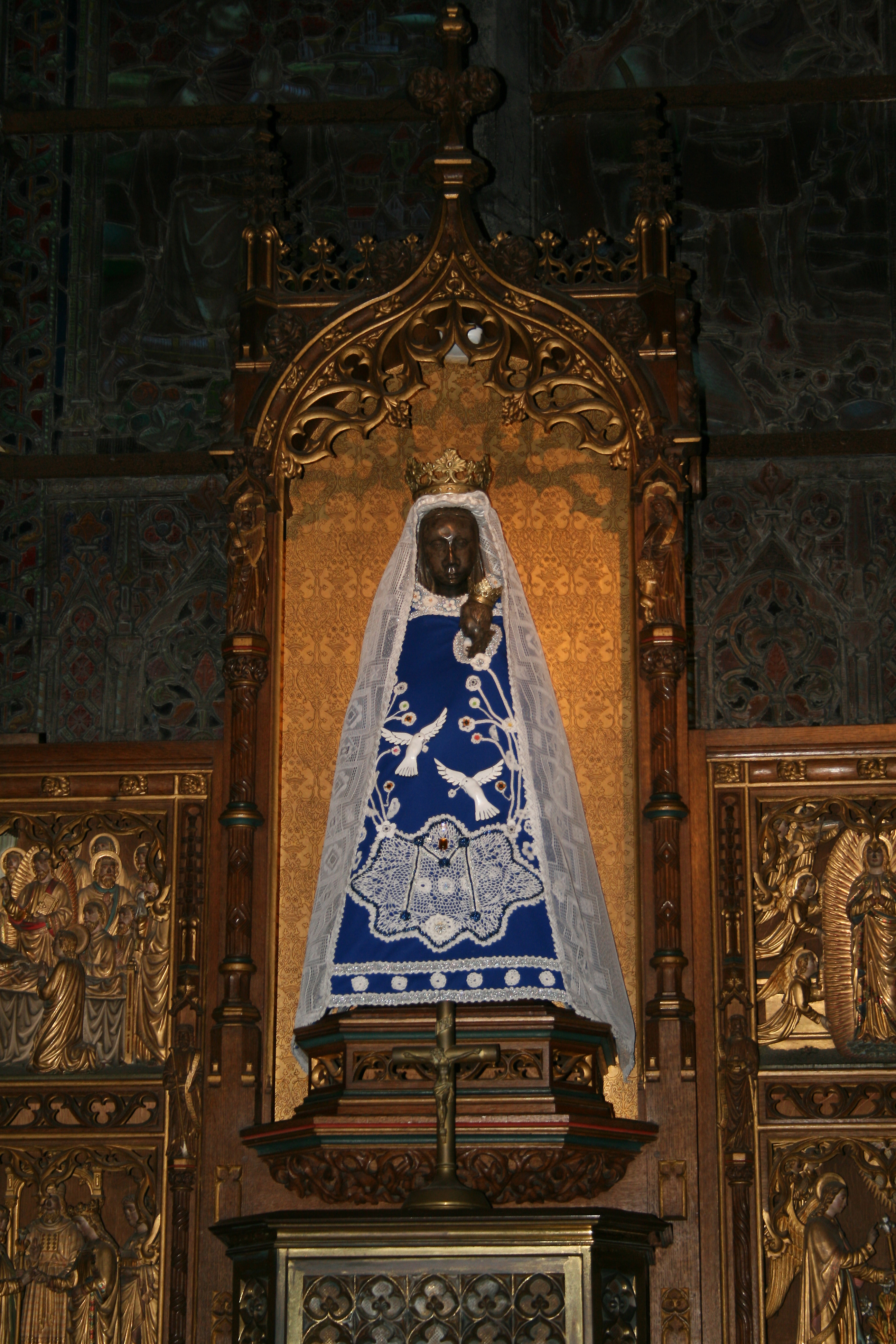 Statue de la vierge romane de la Basilique Saint-Materne (Xe siècle) - Walcourt (Belgique).